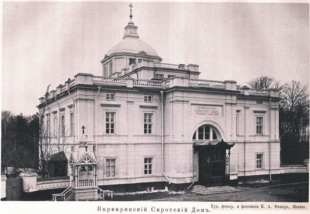 Москва. Варваринский сиротский дом и Церковь Варвары Великомученицы. Фото из книги "Пятидесятилетие Варваринского сиротского Дома Лобковых в Москве"